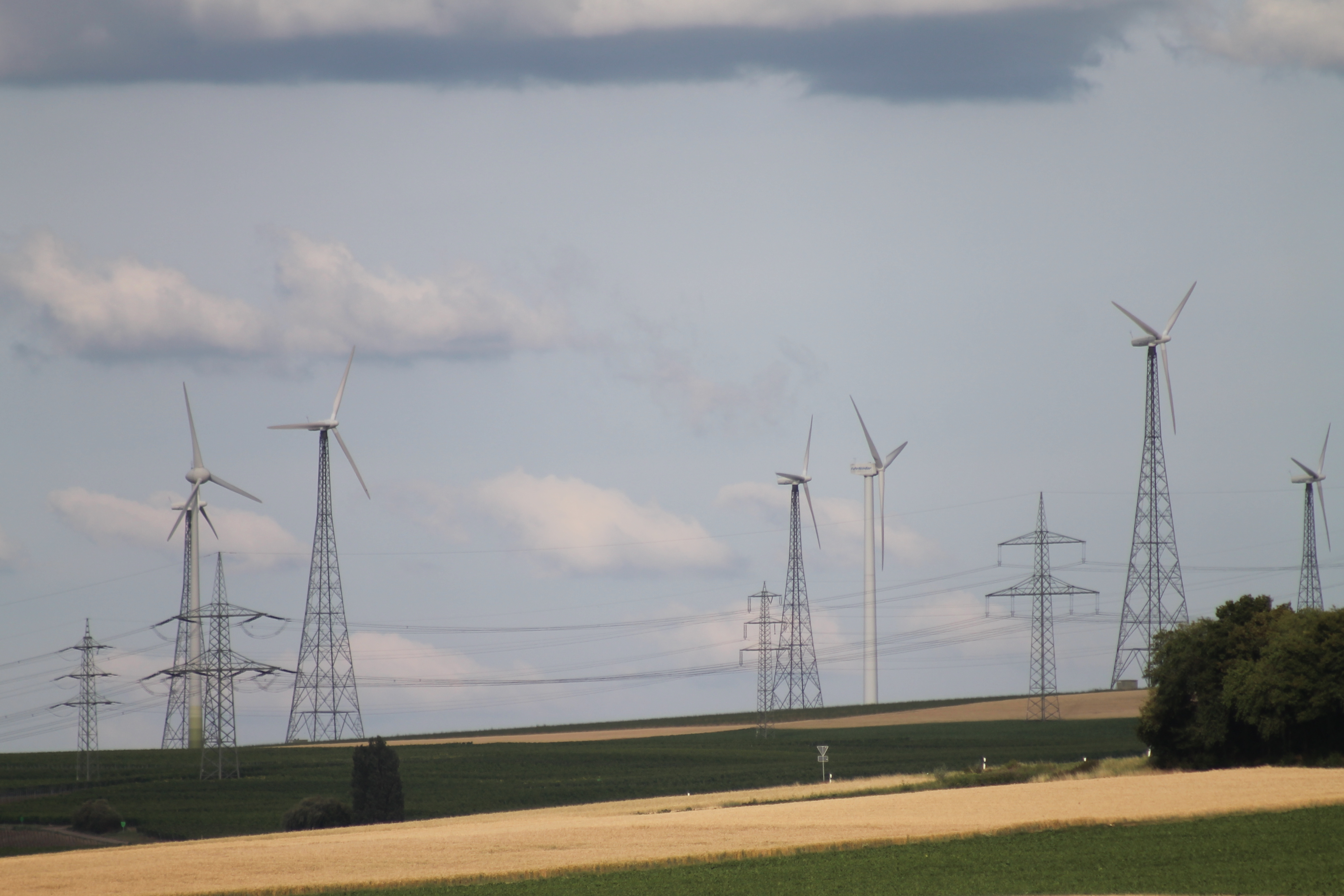 Windkraftanlagen des Windparks Hochborn (u.a. Nordex N43 und Fuhrländer FL1000); davor Freileitungen (Bl. 4523 und Bl. 2327)